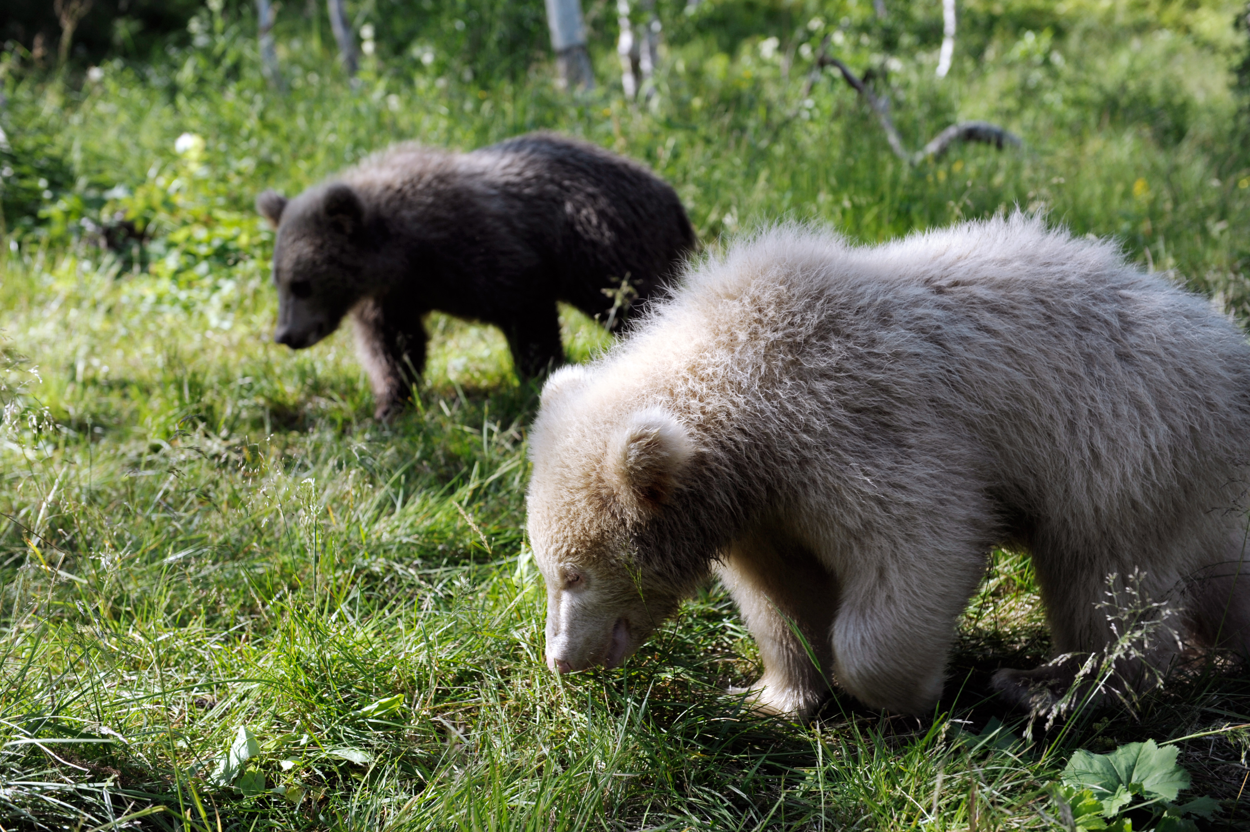 Brunbjörn fotograferad på Polar Zoo Norge